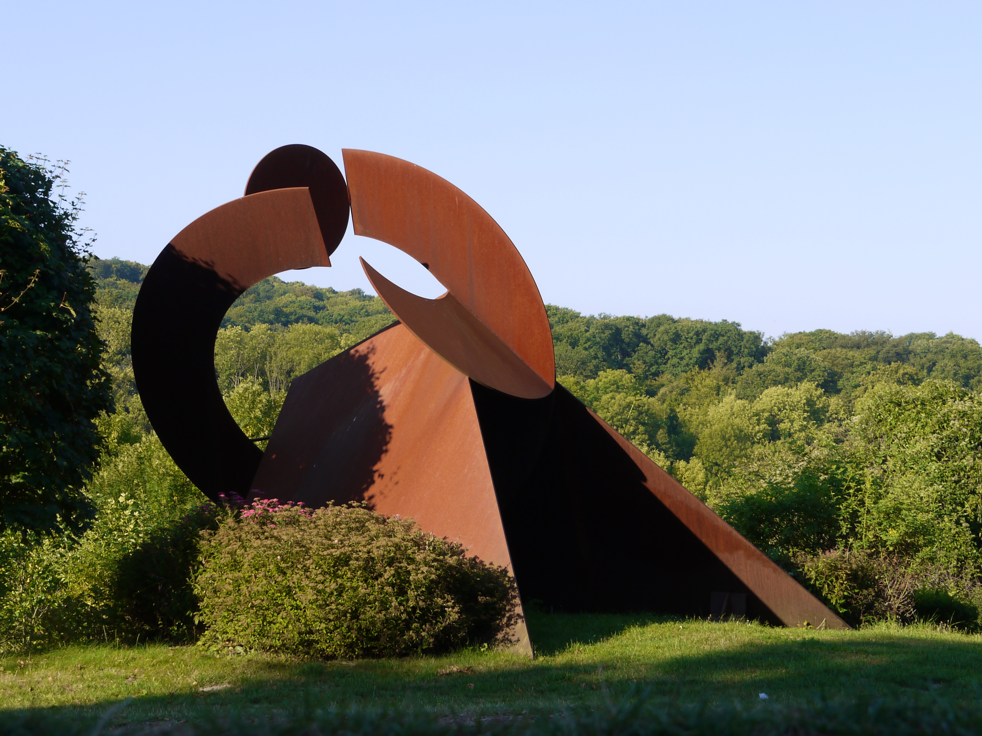 Skulpturenweg Salzgitter-Bad (1) - Jean-Robert Ipoustéguy - „Sonne, Mond, Himmel“ (1999)